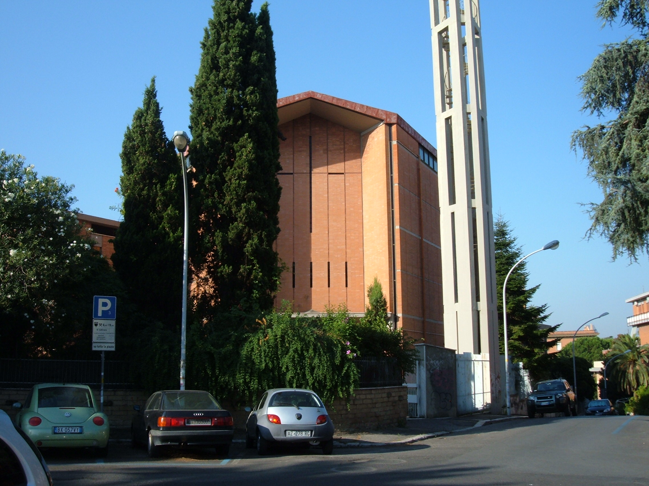 Chiesa parrocchiale di Santa Marcella, a Roma, nel quartiere Ostiense, in piazza Nicoloso da Recco.